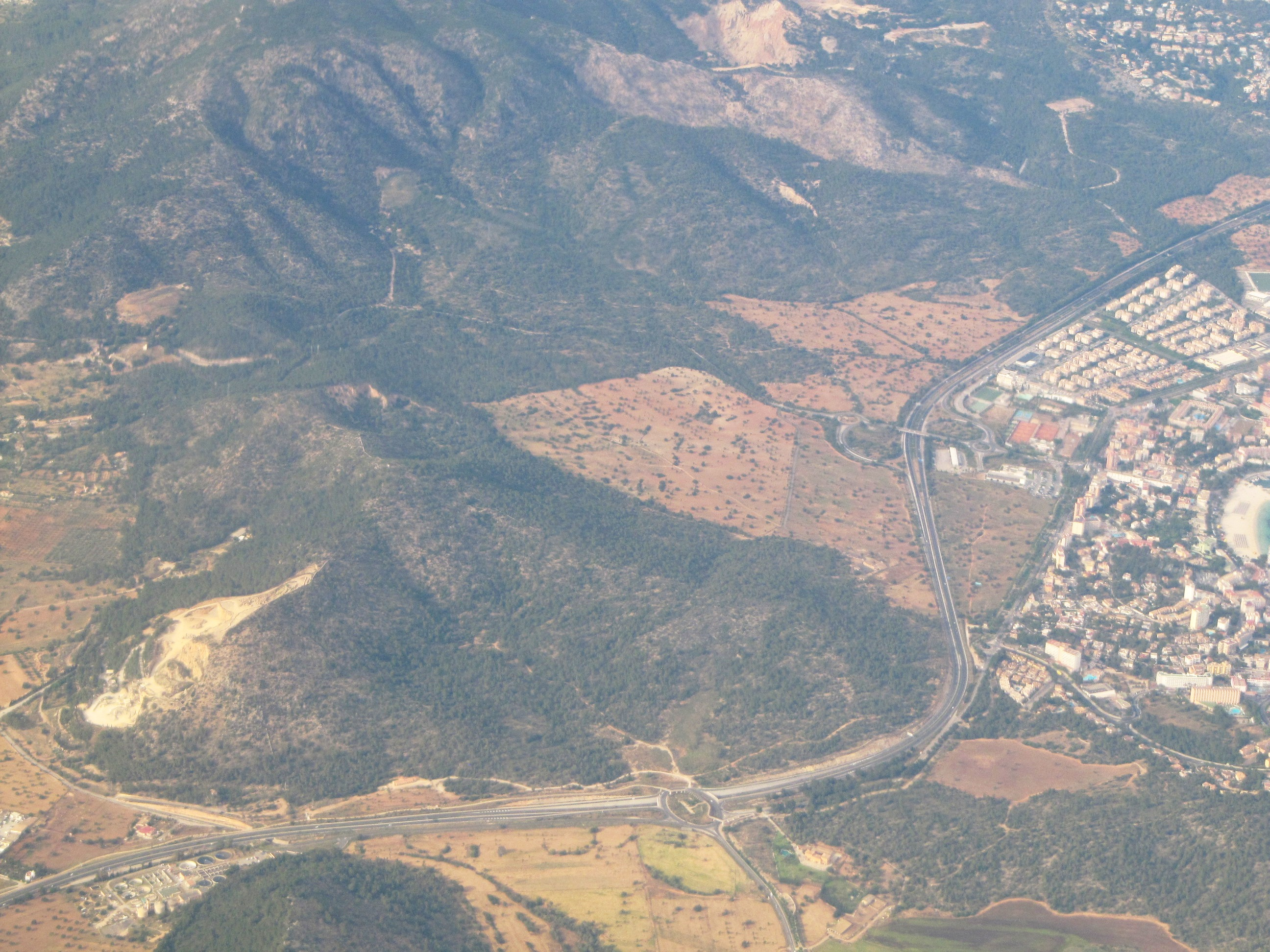 Ma-1 weg